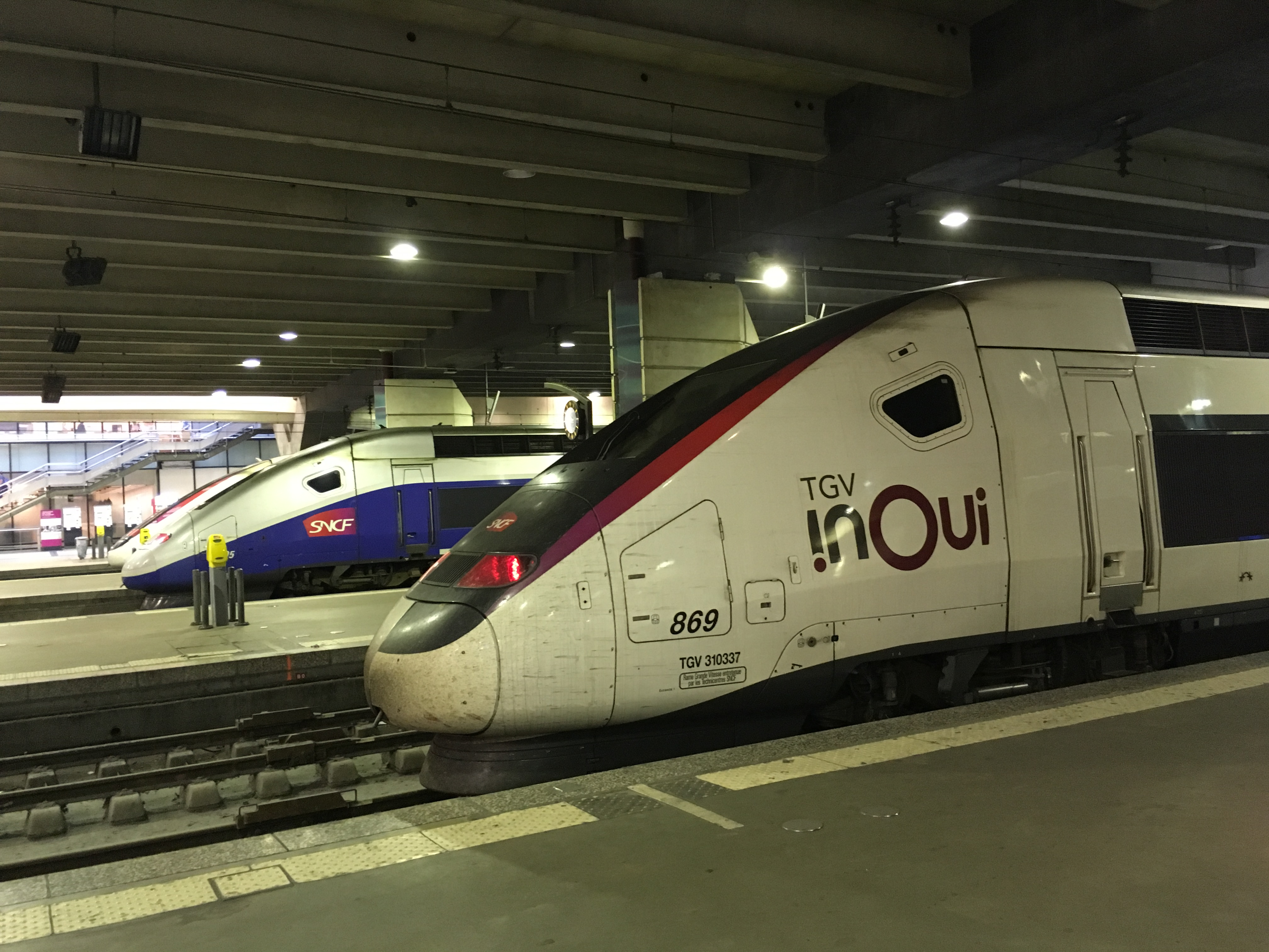 Gare Montparnasse avant de TGV 2N2 livrée Carmillon avec logo ambigramme "InOui" Autres TGV en arrière plan